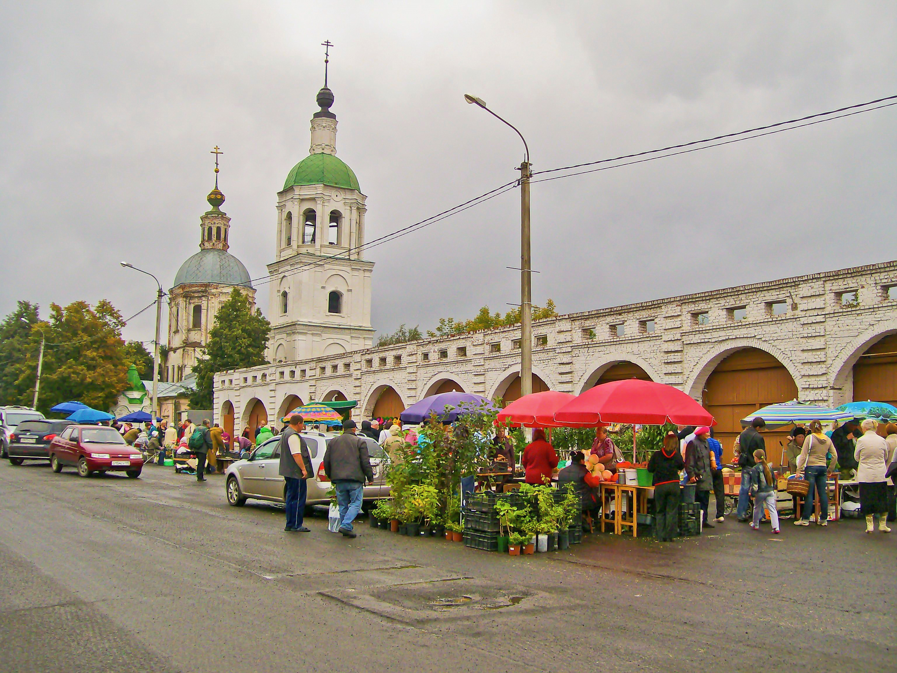 Гостиный двор (торговые ряды) (Москва и Московская область, Зарайск, Революции площадь)